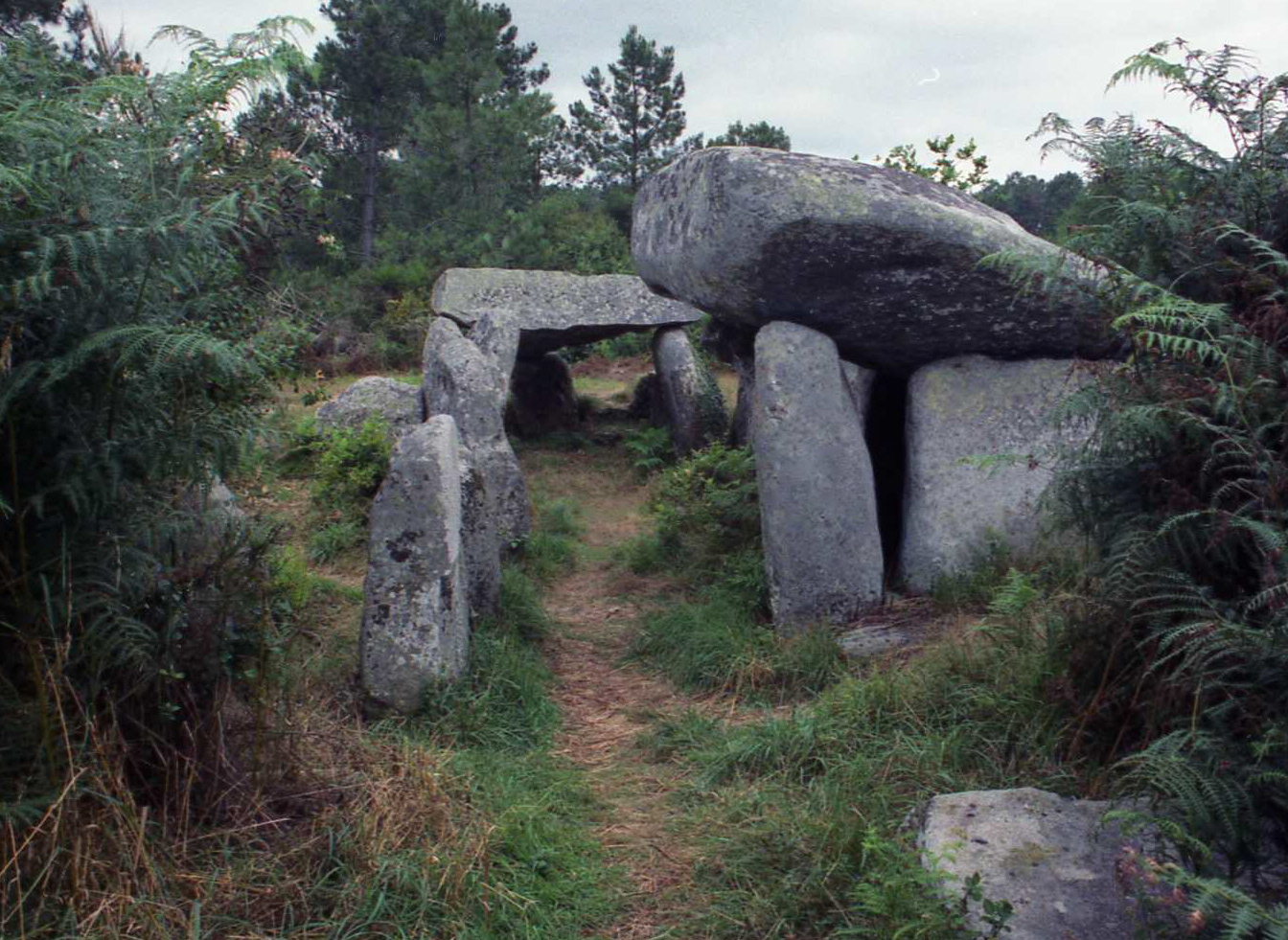 Kerioned